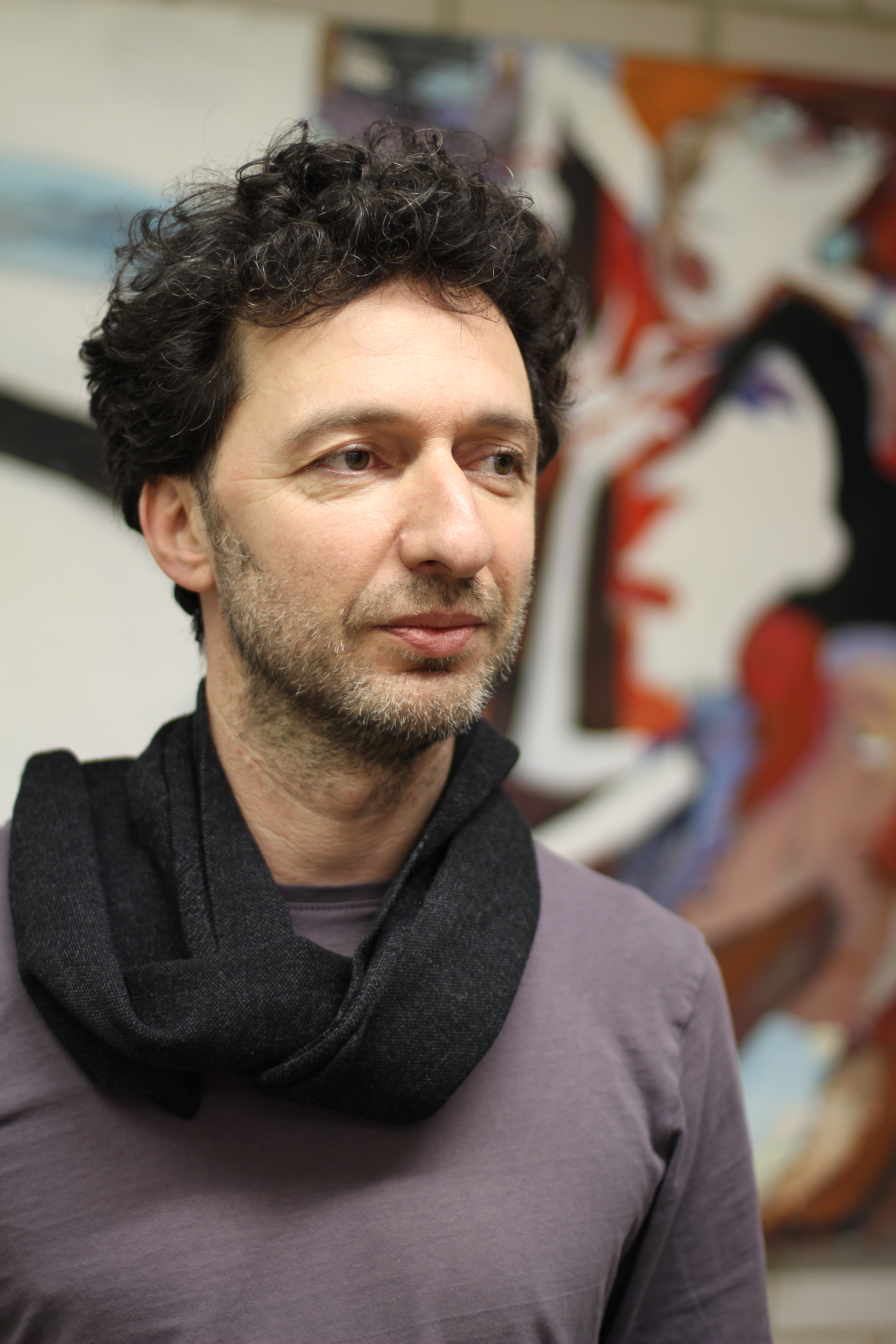 Costa Bernstein in seinem Atelie, 2016